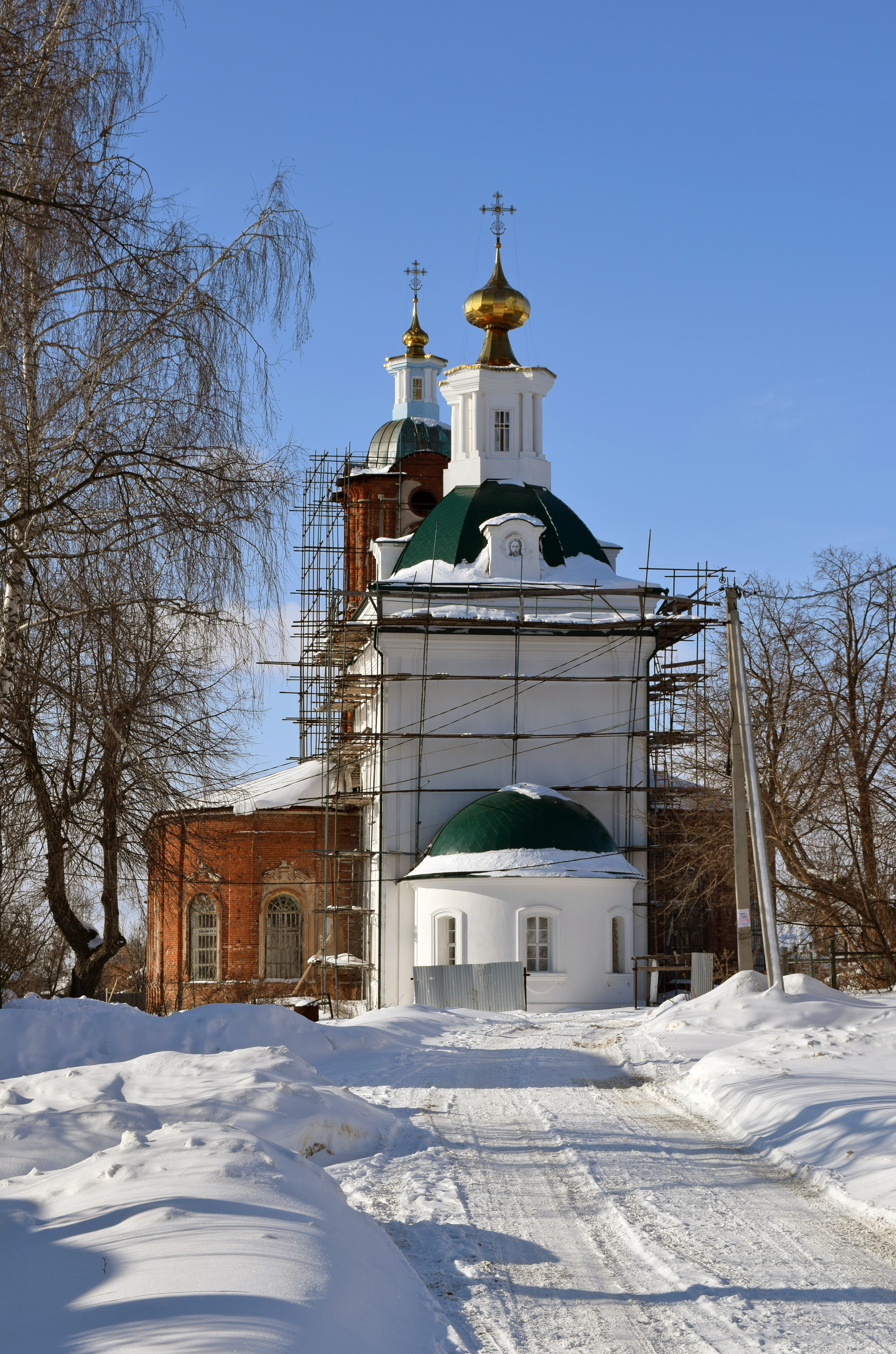 г.Скопин, Рязанская область